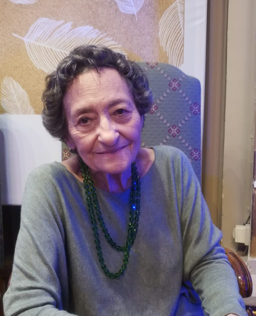 Francisca Aguirre en XX Bilbao Poesía